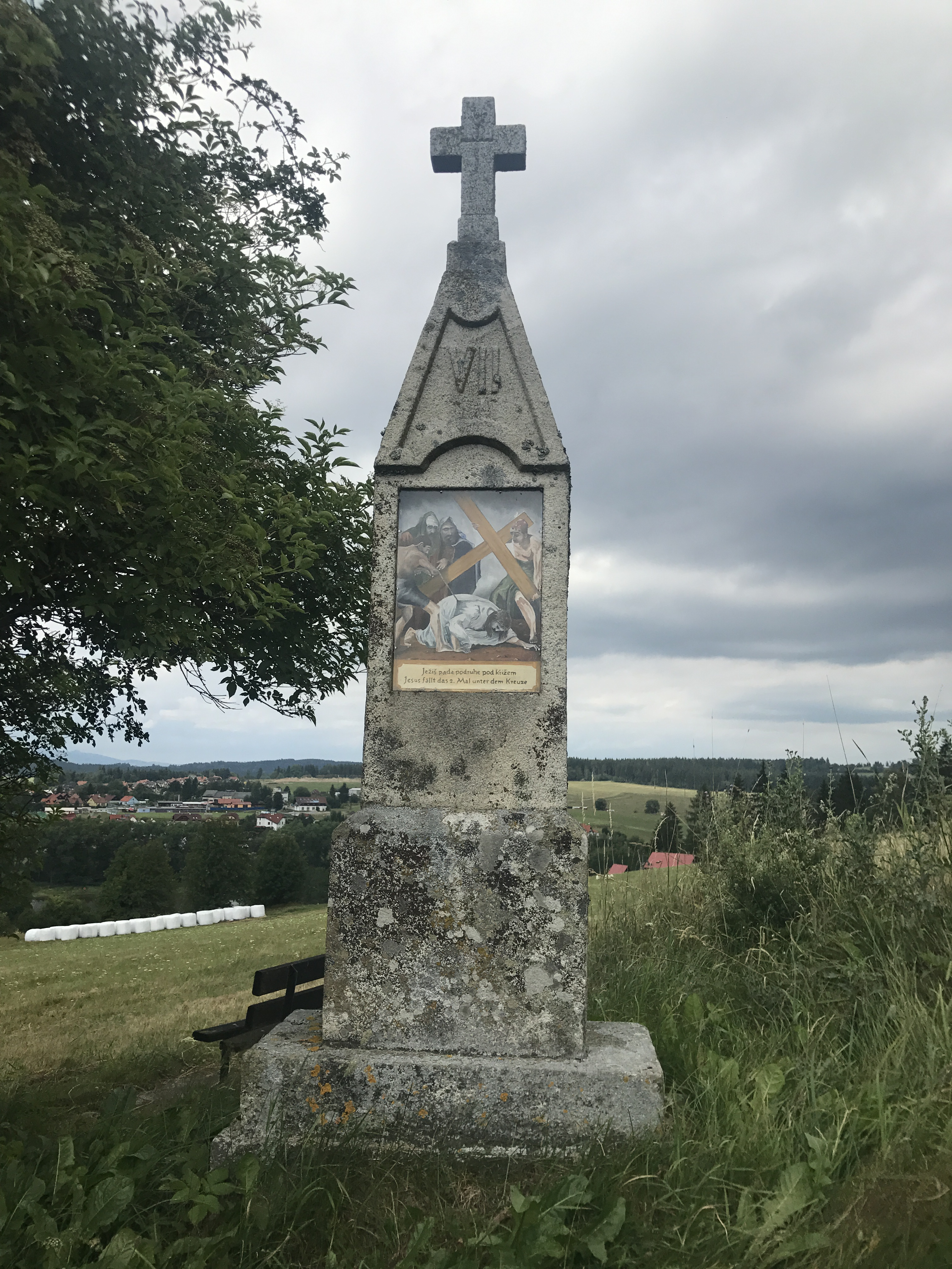 6. zastavení, Křížová cesta Frymburk, kopec Na Martě